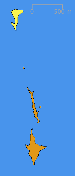 Ostrov Põhja-Malusi v rámci souostroví Malusid.